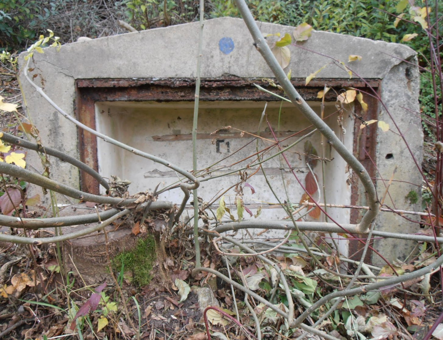 BFH-Plattenwald: Kabelsäule "F1" der Neckar-Enz-Stellung (bereits weitgehend von der Natur zurückerobert)